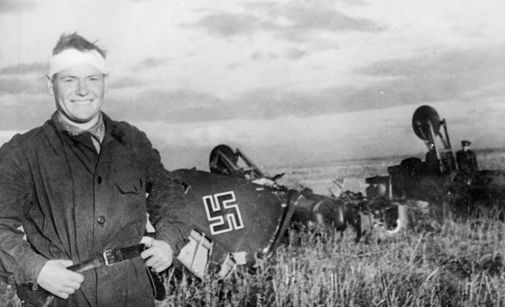 Лётчик-истребитель 237-го истребительного авиационного полка 220-й истребительной авиационной дивизии 16-й Воздушной армии Сталинградского фронта сержант Илья Михайлович Чумбарёв у обломков сбитого им при помощи тарана немецкого самолета-разведчика Фокке-Вульф Fw 189. 1942 г